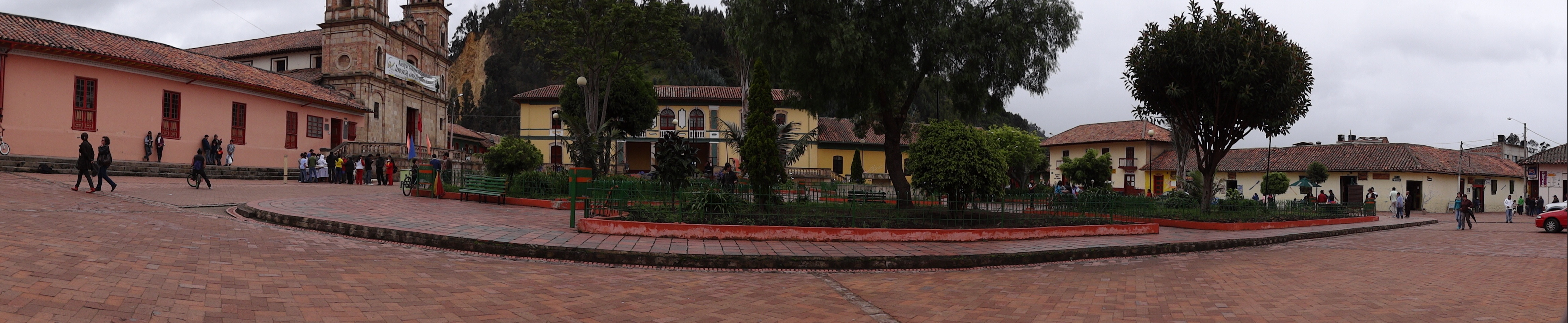 Panorámica, Parque principal, Nemocón, Cundinamarca, Colombia